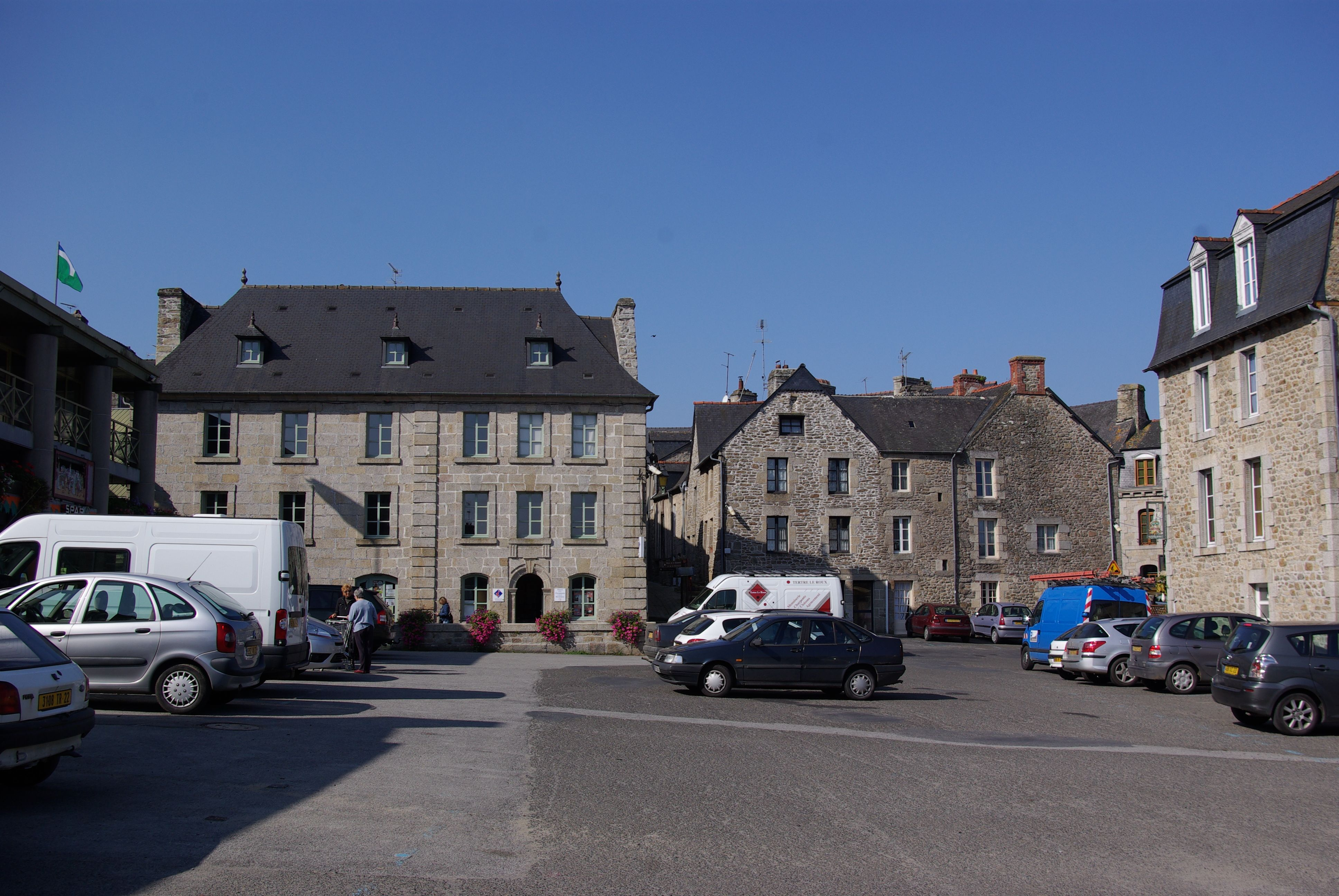 Place de la Carrière située au centre de Moncontour (Côtes-d'Armor, Bretagne, France) ; avec au fond l'office de tourisme.